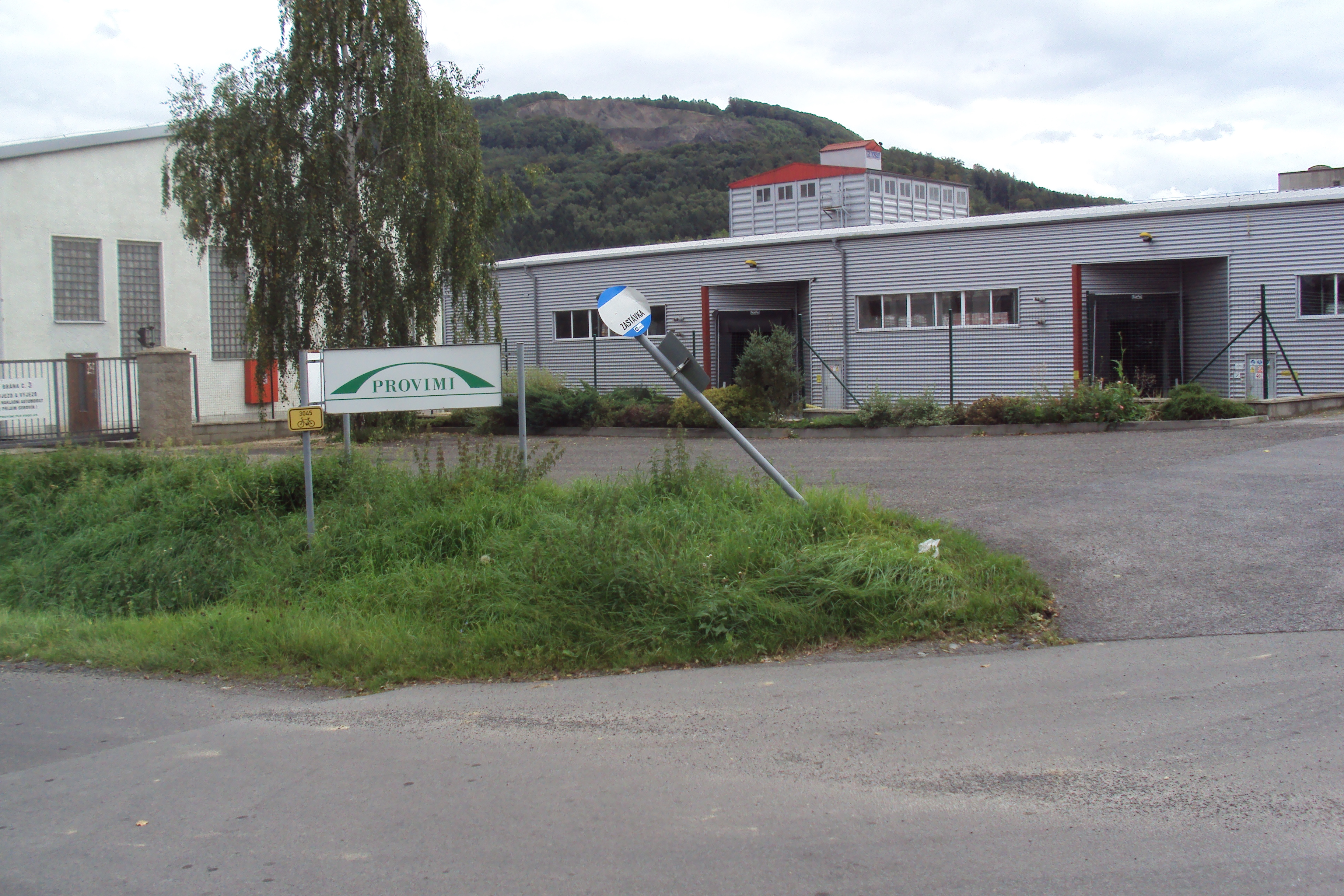 Areál firmy PROVIMI Brniště, výroba krmiv, asi 2 km od obce na samotě